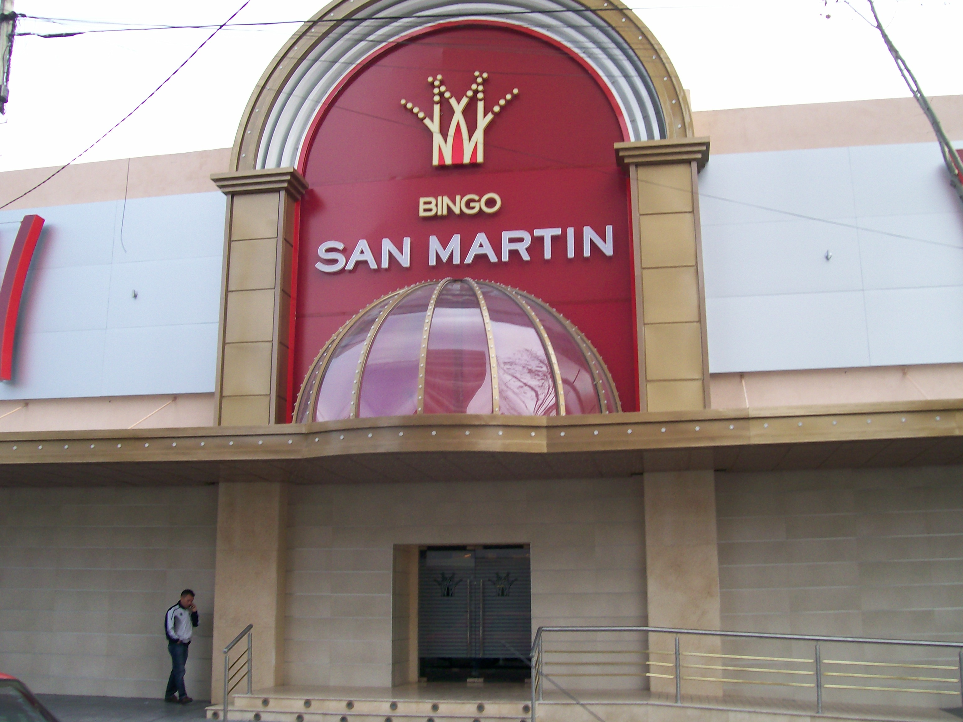 bingo Royal, de san martin